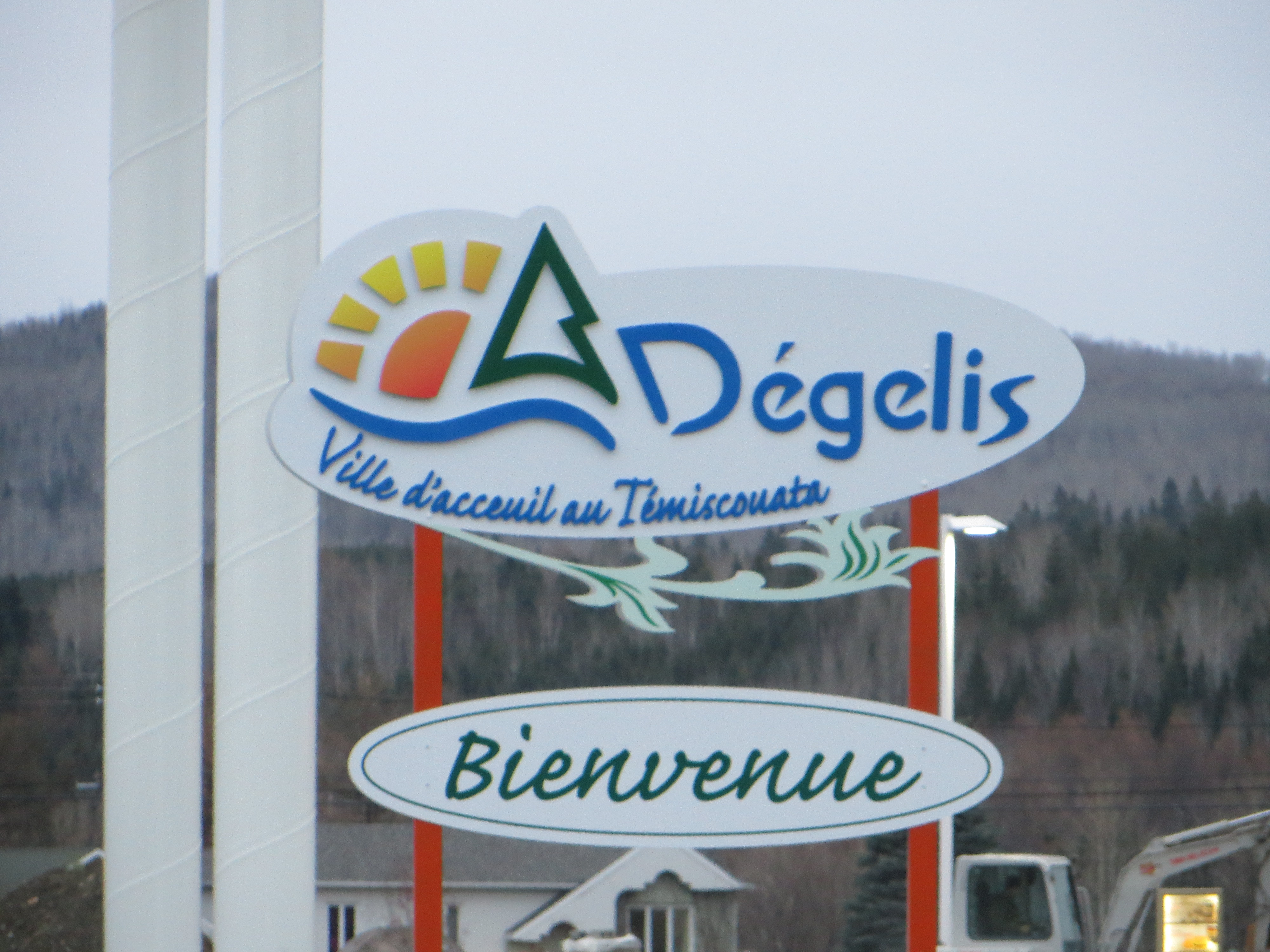 Aviso de bienvenida de Dégelis.